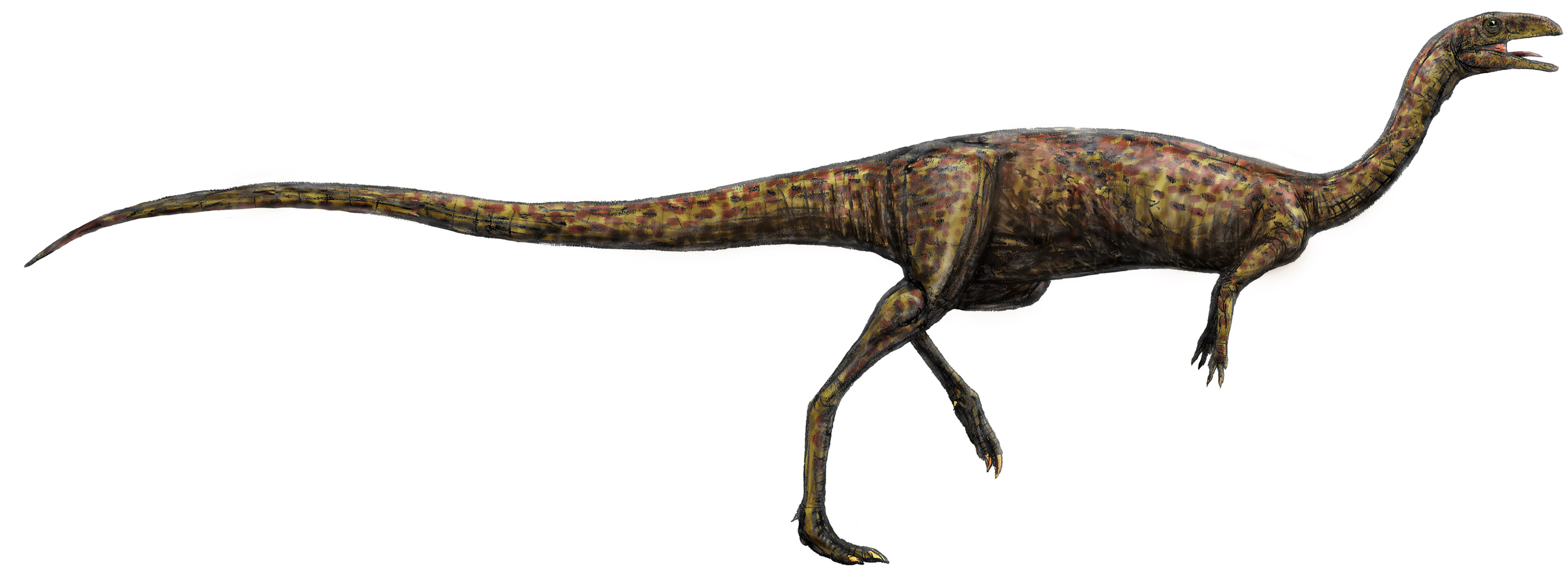 Elaphrosaurus bambergi. Head and hands based on Limusaurus.